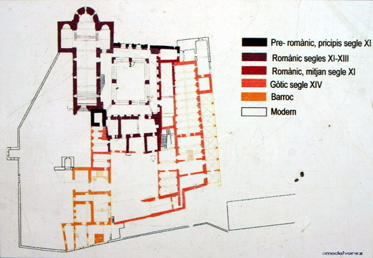 Planta Monestir Sant Benet de Bages (Catalunya). Estil romànic i gótic. / . Layout. Romanesque. Gothic. S.XI S.XVI